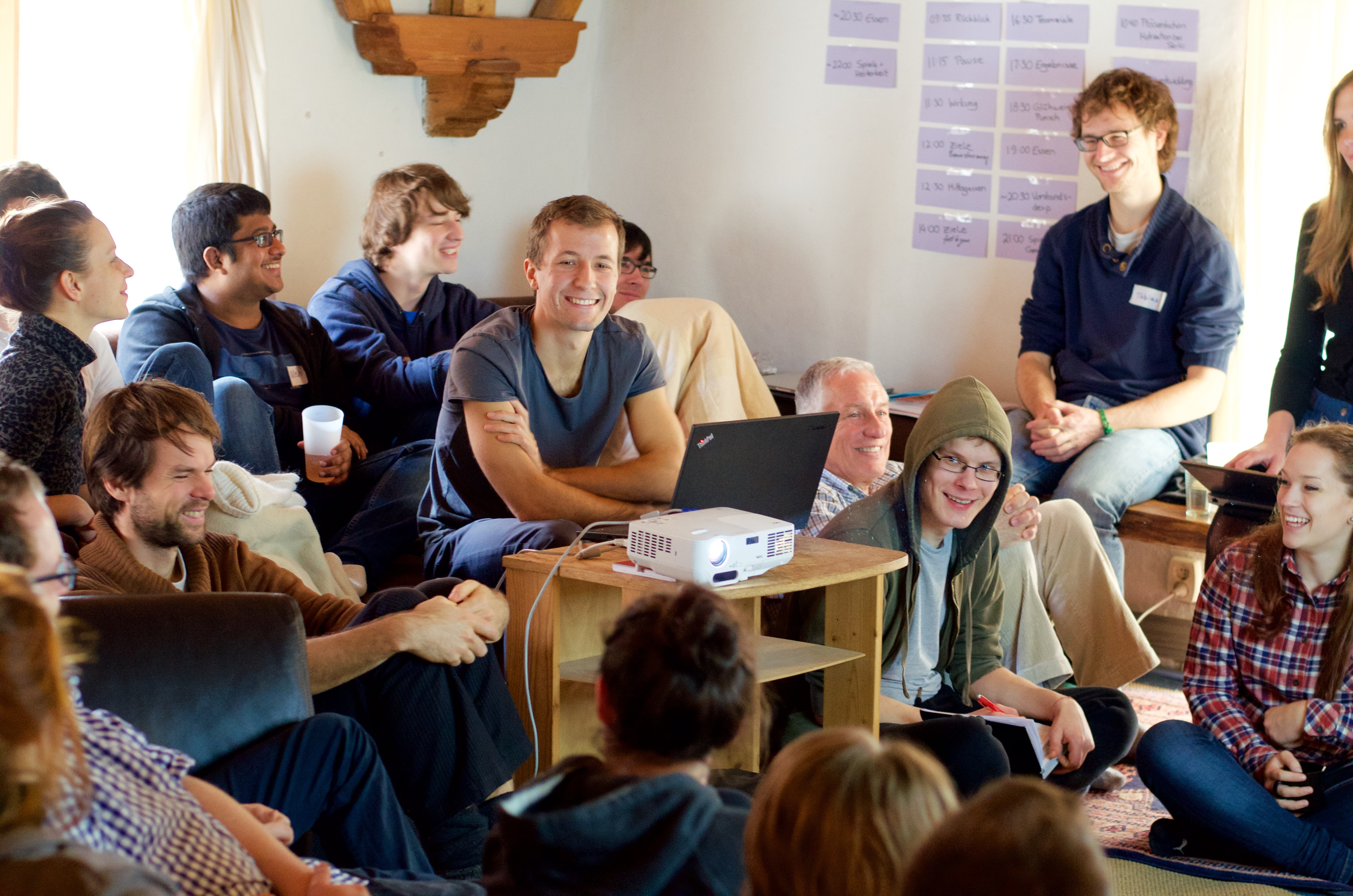 Gruppenfoto von Serlo während einer Präsentation auf der Klausurtagung 2015